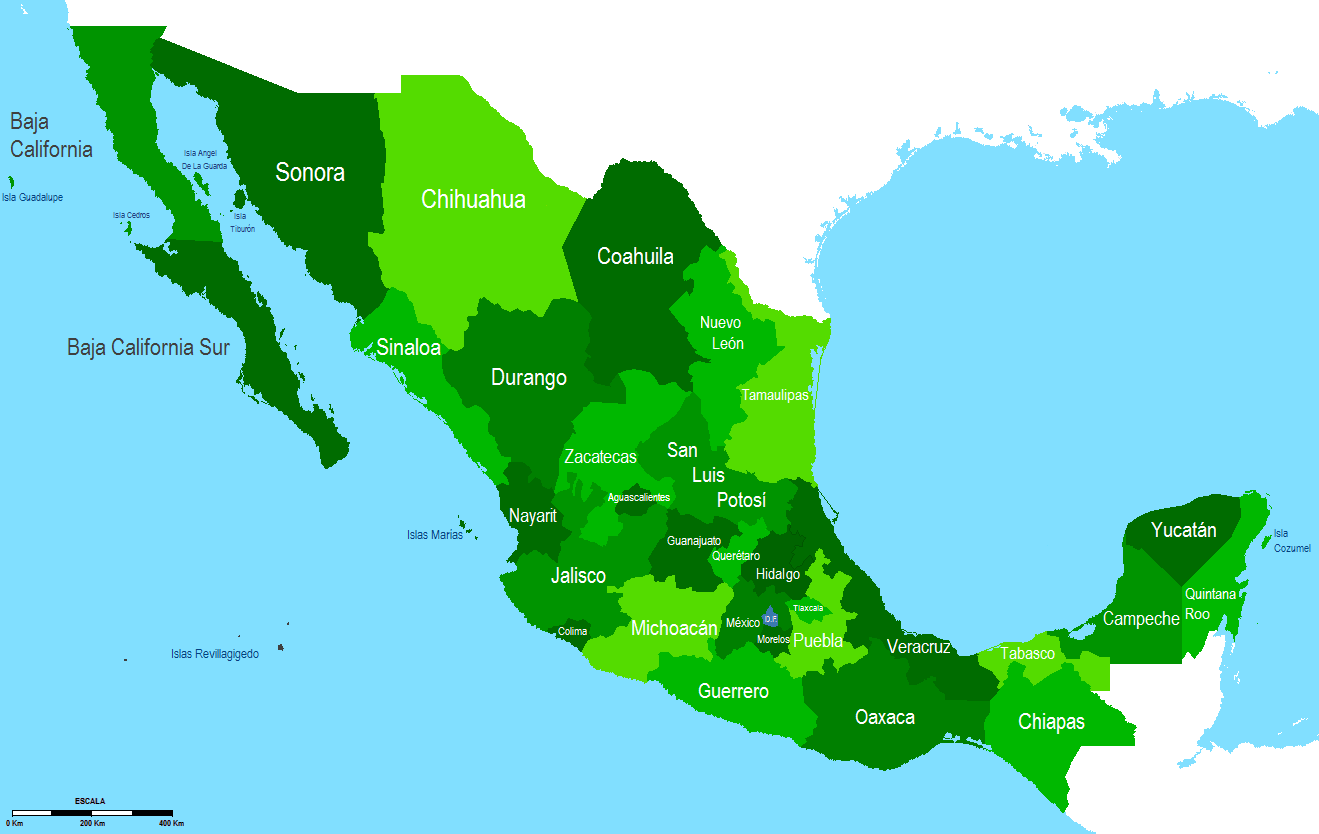 Mapa de Mexico 2010